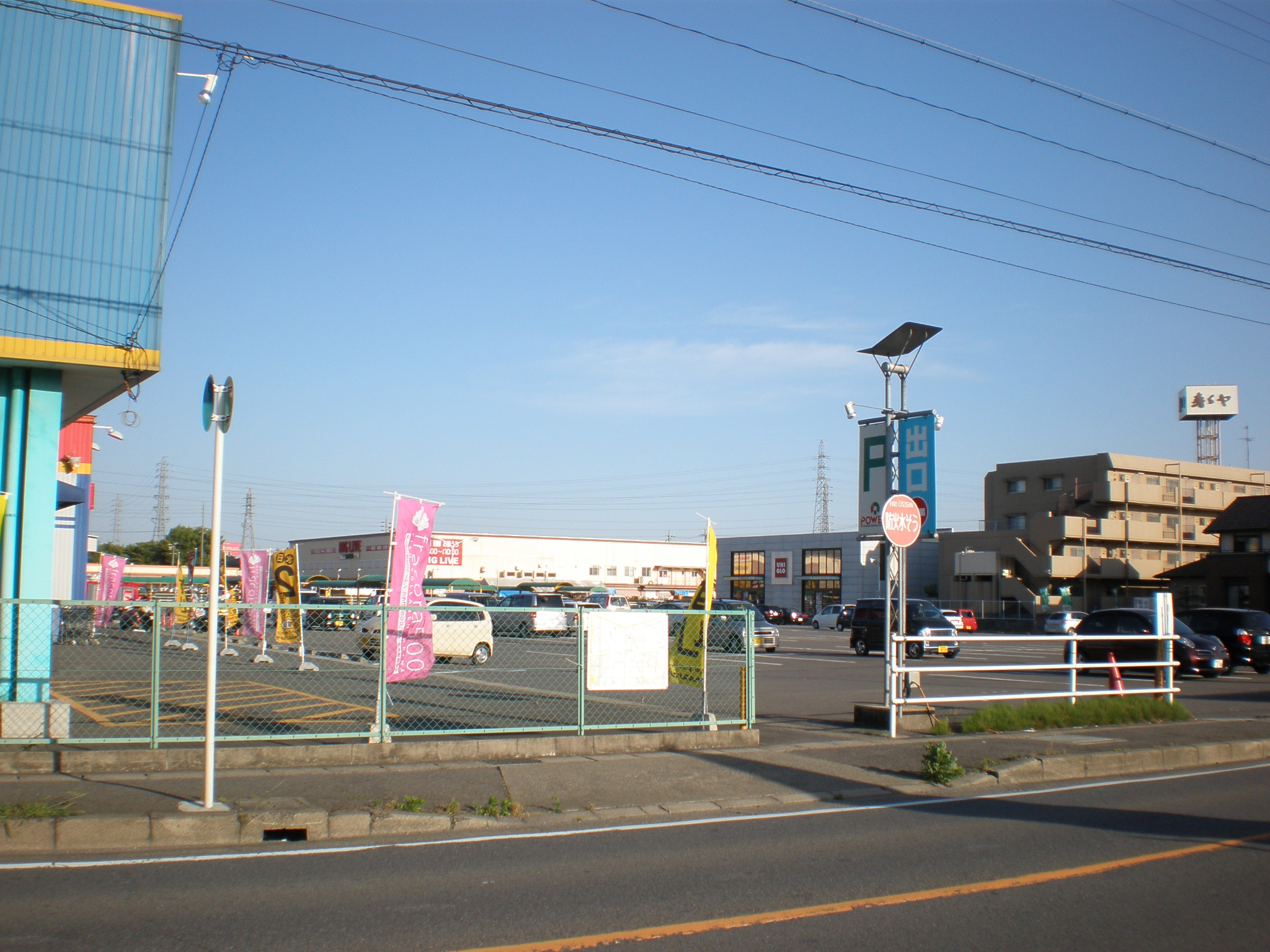 愛知県小牧市にあるパワーズセンター小牧（パワーズ小牧）